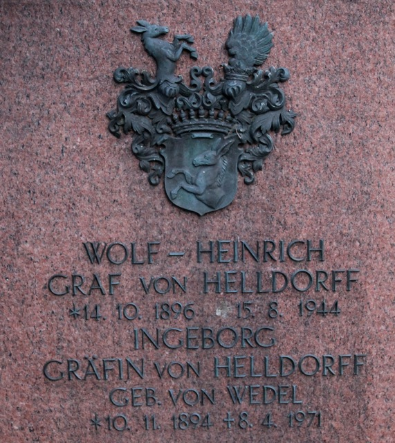 Grabstein von Wolf-Heinrich Graf von Helldorff und Ingeborg Gräfin von Helldorff, am Familiengrab der von Helldorffs in Tangstedt/Kreis Stormarn, Schleswig-Holstein.